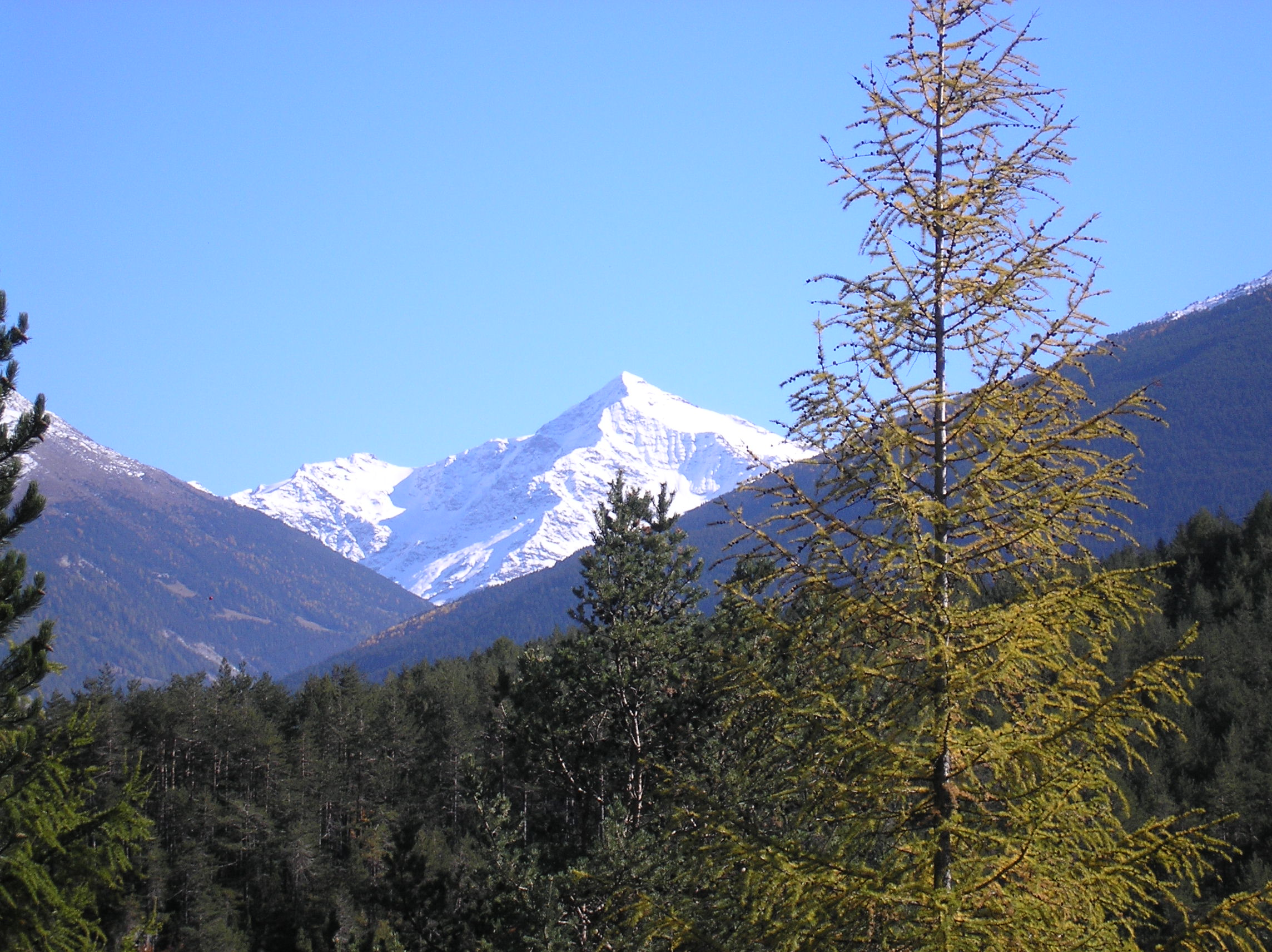 Il monte Tresero che domina la Valfurva